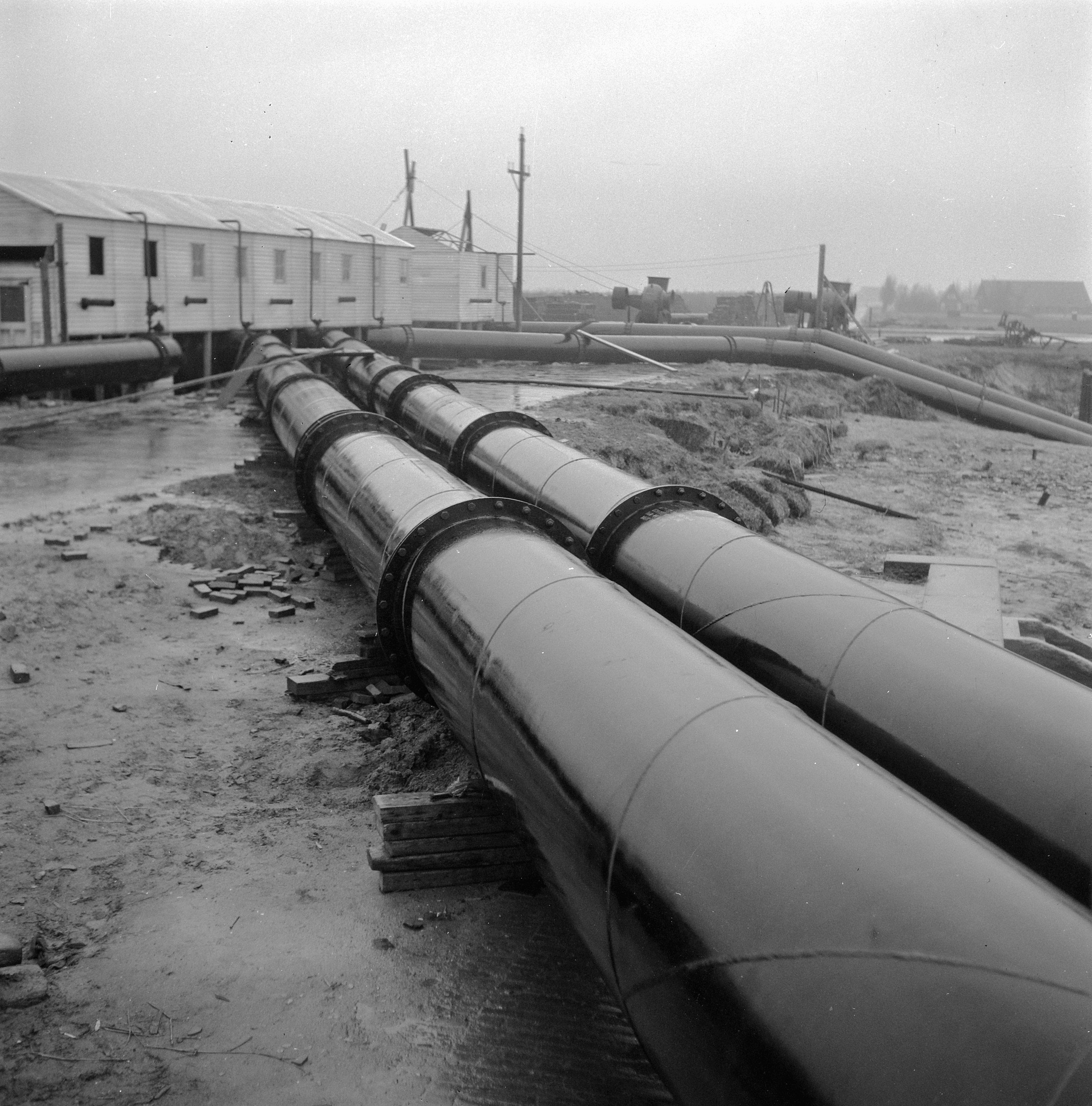 Collectie / Archief : Fotocollectie Anefo Reportage / Serie : [ onbekend ] Beschrijving : Wieringermeer. Bij Medemblik werden hulpgemalen ingezet (voorjaar 1945) om de Wieringermeerpolder zo snel mogelijk weer droog te krijgen na de inundatie. Datum : 3 december 1945 Locatie : Noord-Holland, Wieringermeer Trefwoorden : pijpleidingen Fotograaf : Breijer, Charles / Anefo Auteursrechthebbende : Nationaal Archief Materiaalsoort : Negatief (zwart/wit) Nummer archiefinventaris : bekijk toegang 2.24.01.03 Bestanddeelnummer : 901-1846